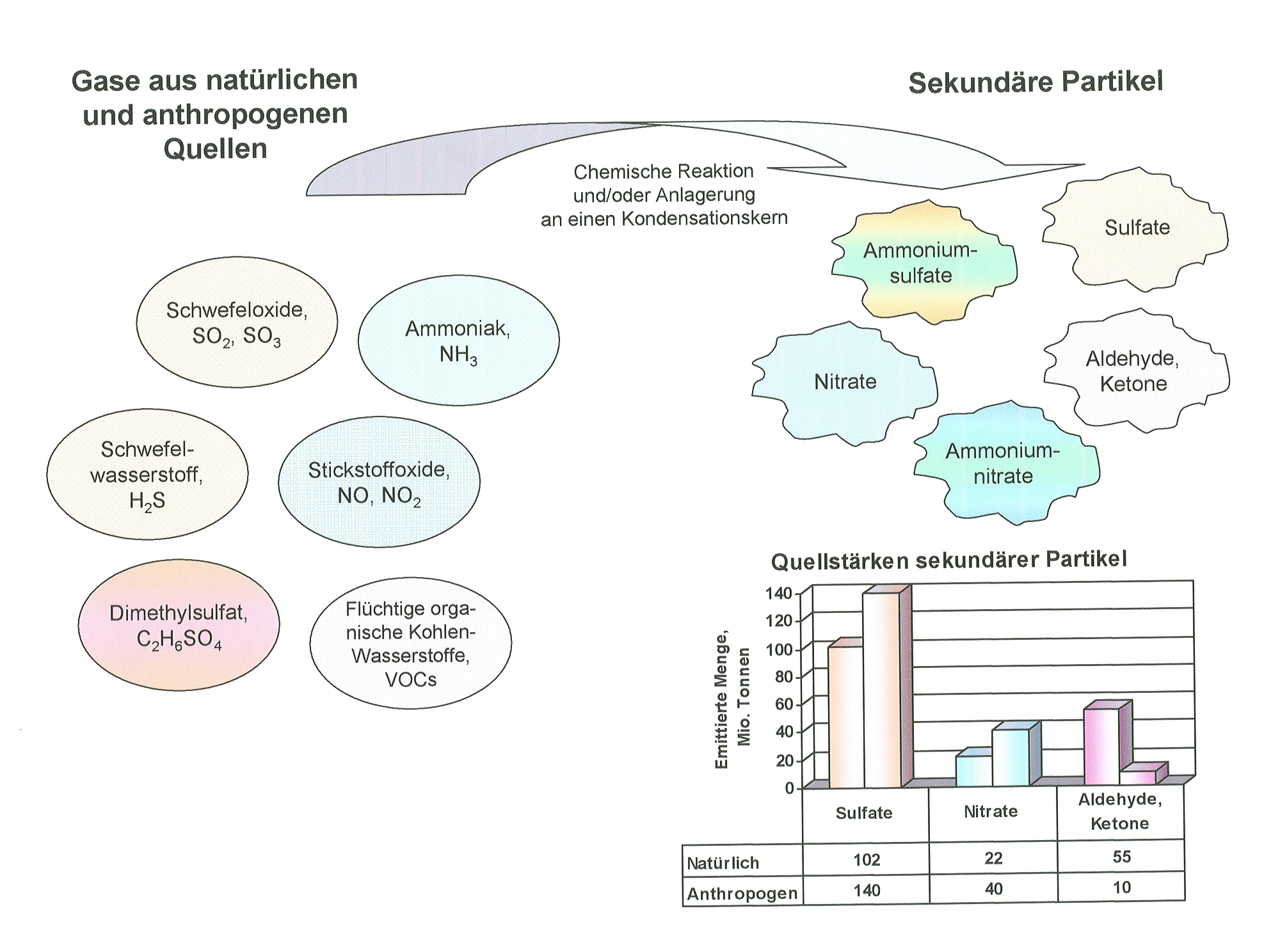 Bildung sekundärer Partikel